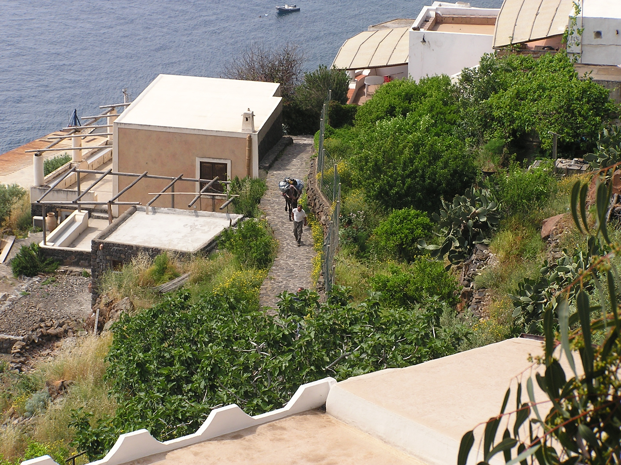 Alicudi, doprava je možná pouze soumary